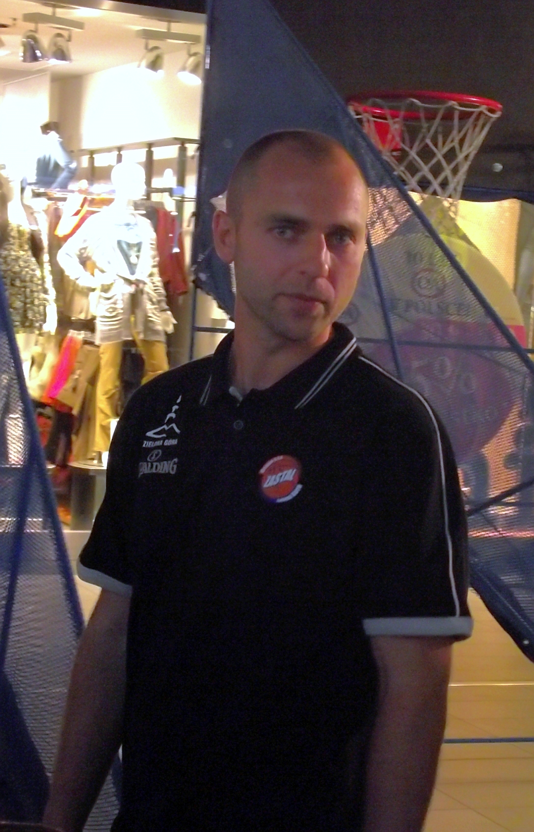 Marcin Flieger podczas prezentacji Zastalu Zielona Góra przed sezonem 2011/12.